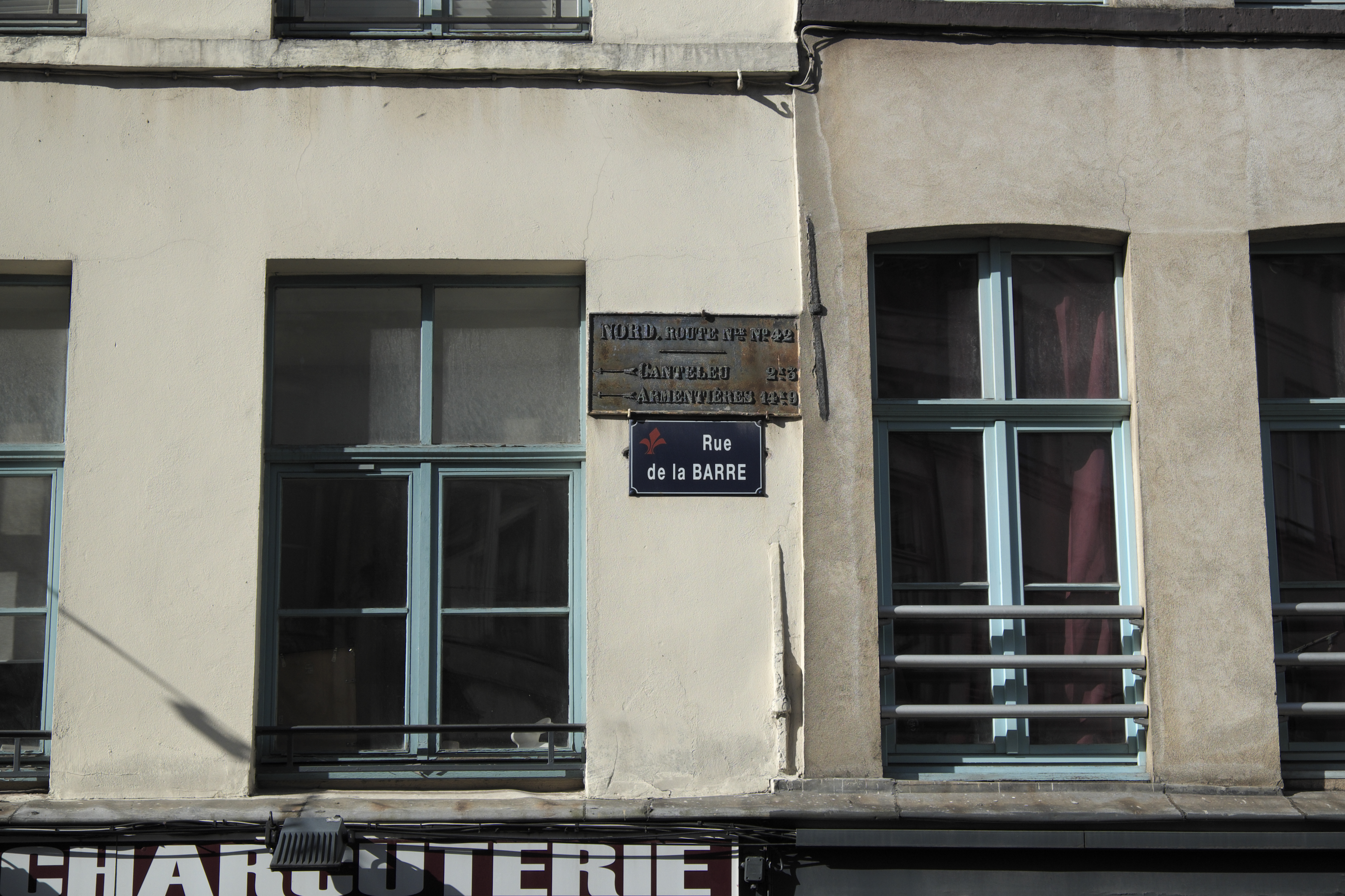 Schild Route Nationale n° 42 in der Rue de la Barre in Lille im Département Nord (Hauts-de-France/Frankreich)